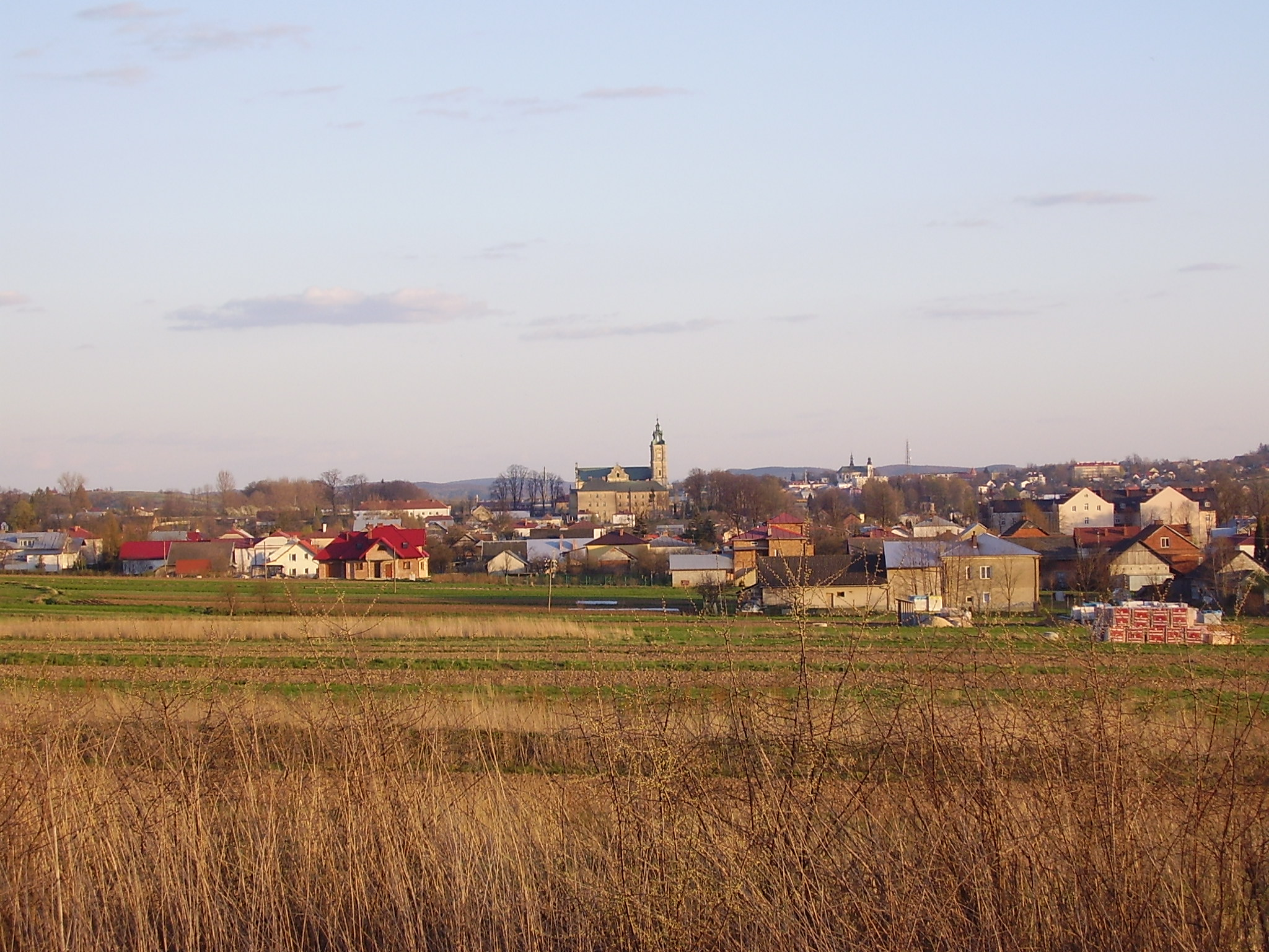 Widok Starej Wsi pod Brzozowem (tzw. Duża Strona). Na środku zdjęcia klasztor jezuitów i bazylika. W oddali kolegiata w Brzozowie.